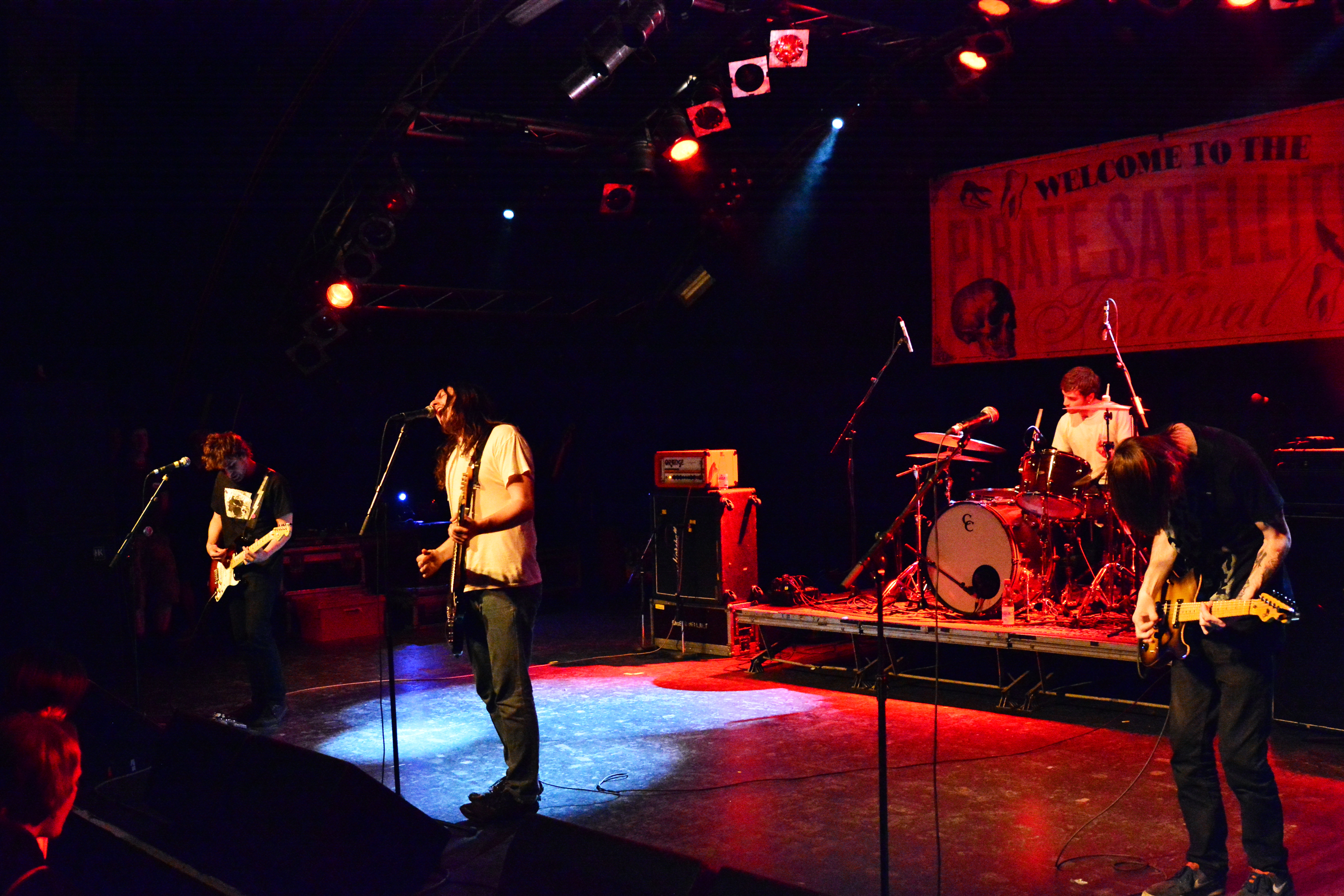 The Hotelier beim Pirate Satellite Festival 2015 in der Hamburger Markthalle